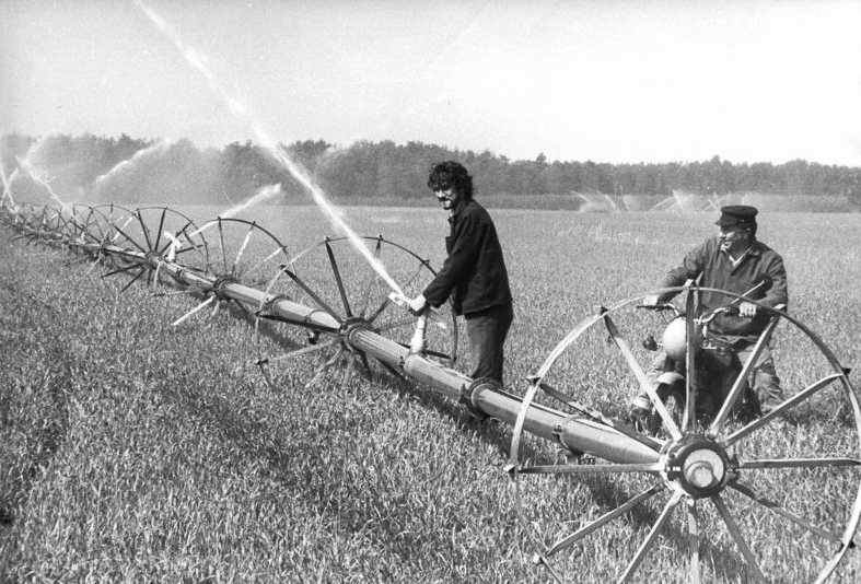 Sülstorf, Beregnungsanlage im Einsatz ADN-ZB Pätzold-31.5.1989-We Bez. Schwerin: Beregnung - Angesichts der anhaltenden Trockenheit unterstützen viele zusätzliche Arbeitskräfte die Beregnungsbrigade der LPG (P) "Karl Marx" Sülstorf. Traktorist Rene Hartmann (1) und Maurer Horst Bartz sind zweischichtig im Einsatz und sichern das regelmäßige Umsetzen der Beregnungsanlagen auf Gemüse-, Gras-, Kartoffel- und Getreideflächen.